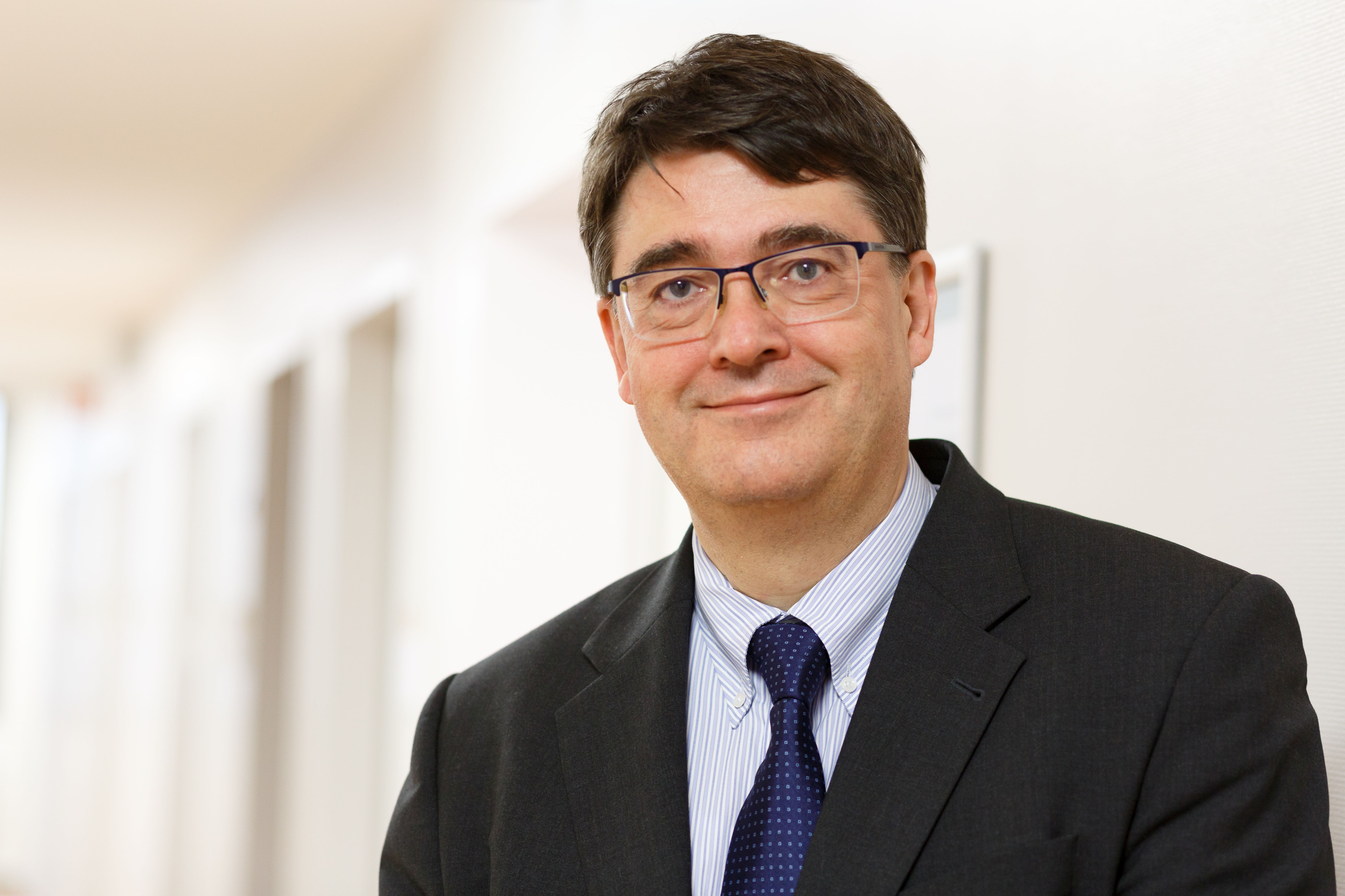 Prof. Michael Baumann, Wissenschaftlicher Vorstand und Vorstandsvorsitzender des Deutschen Krebsforschungszentrums